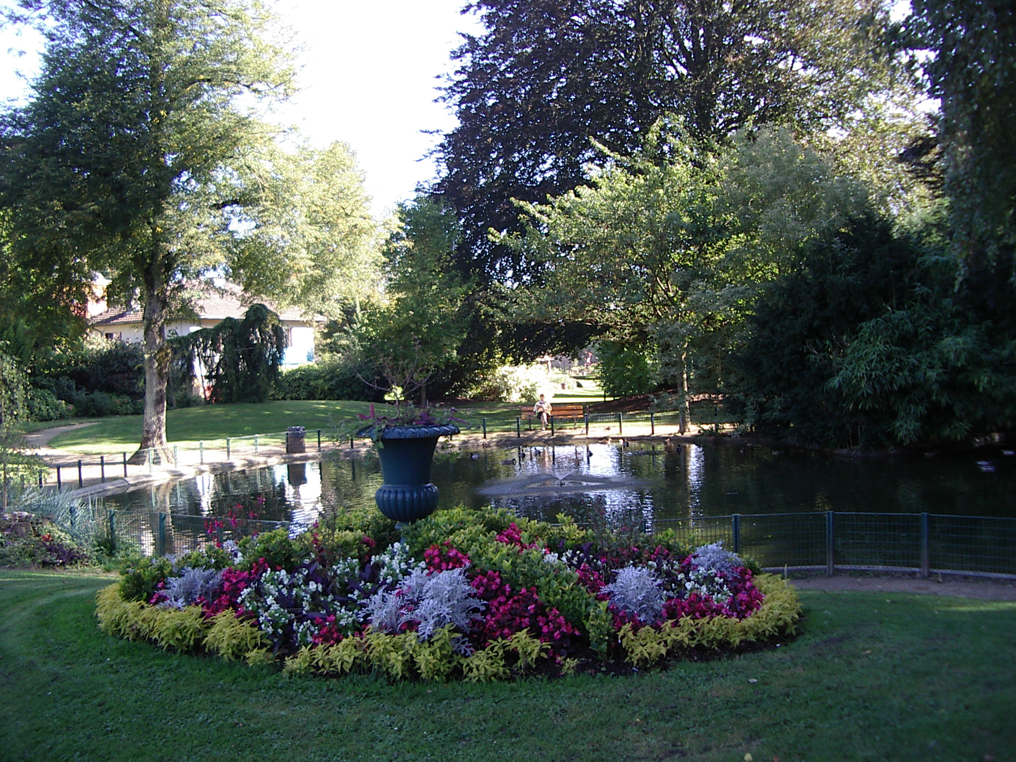 Jardin botanique de Sedan